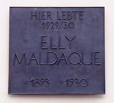 Gedenktafel Elly Maldaque an ihrem letzten Wohnort Orleanstraße 4, Regensburg